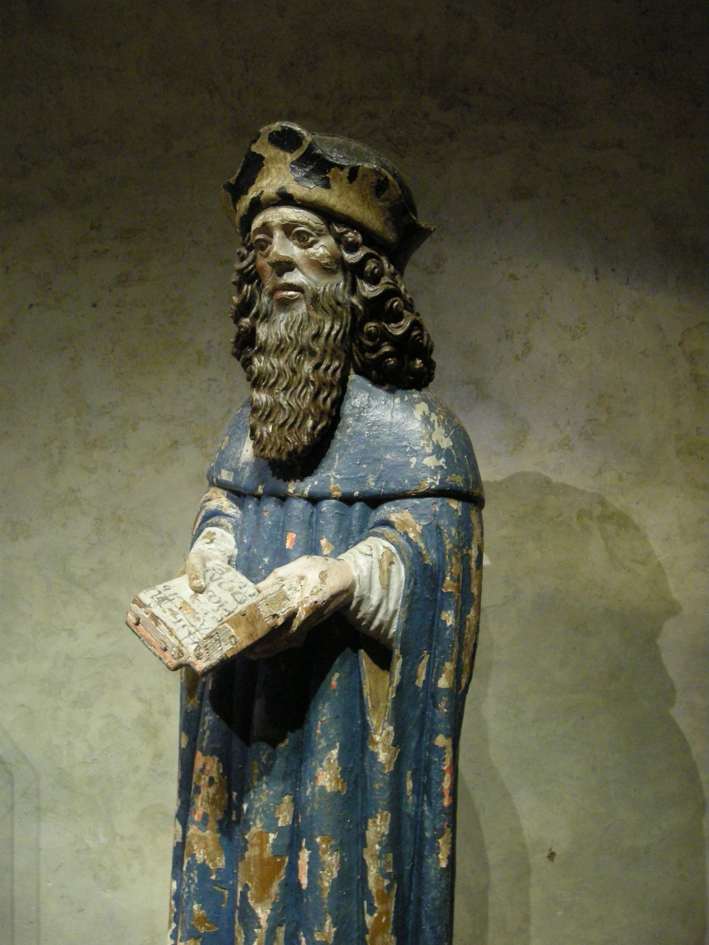 Statue en bois de saint Nicodème, (en provenance de Bourgogne ?), présentée dans le cadre de l'exposition "Fragments d'Histoire" à l'abbaye de Hambye (Normandie)